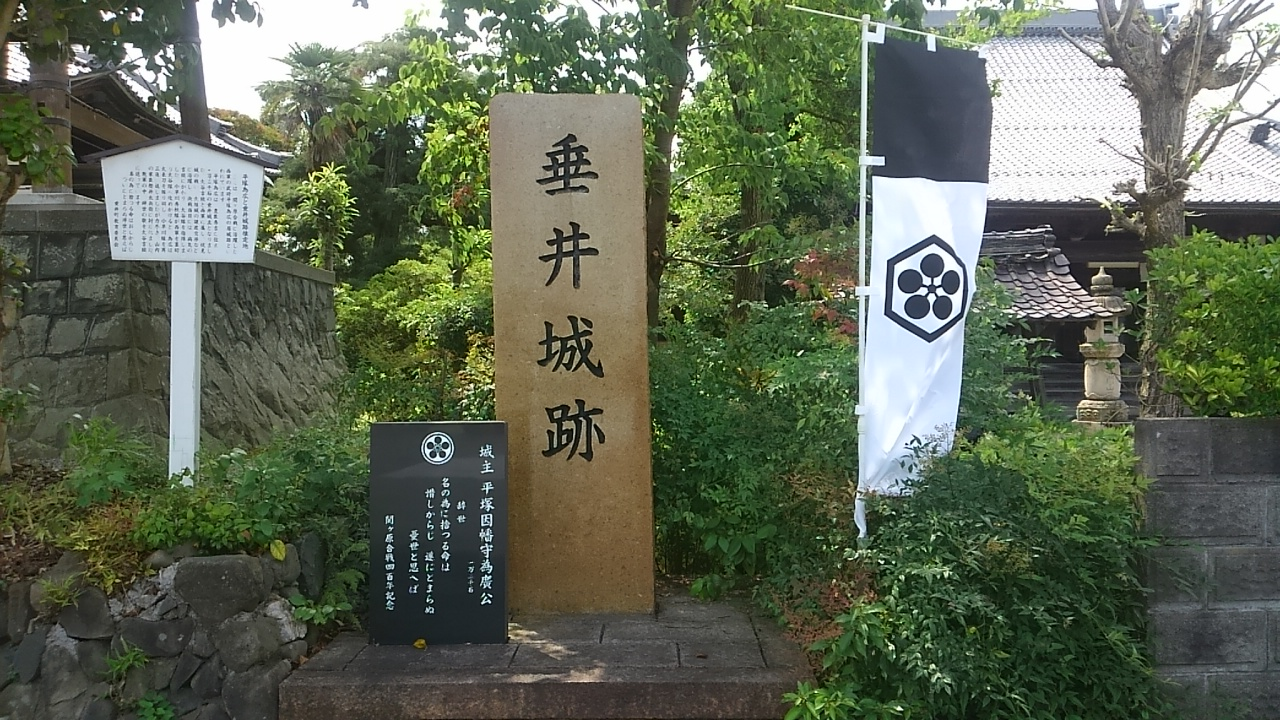 垂井城址の碑